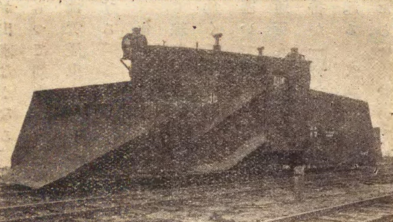 鉄道省ユキ17形貨車（のちキ200形を経てキ500形）。日本初の木製複線用ラッセル式雪かき車。